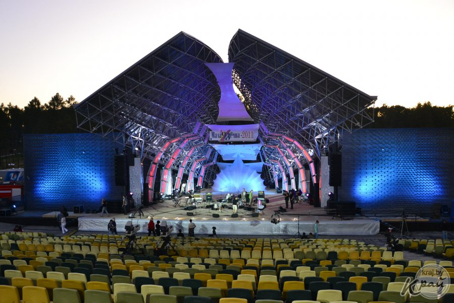 Амфитеатр в г.Молодечно